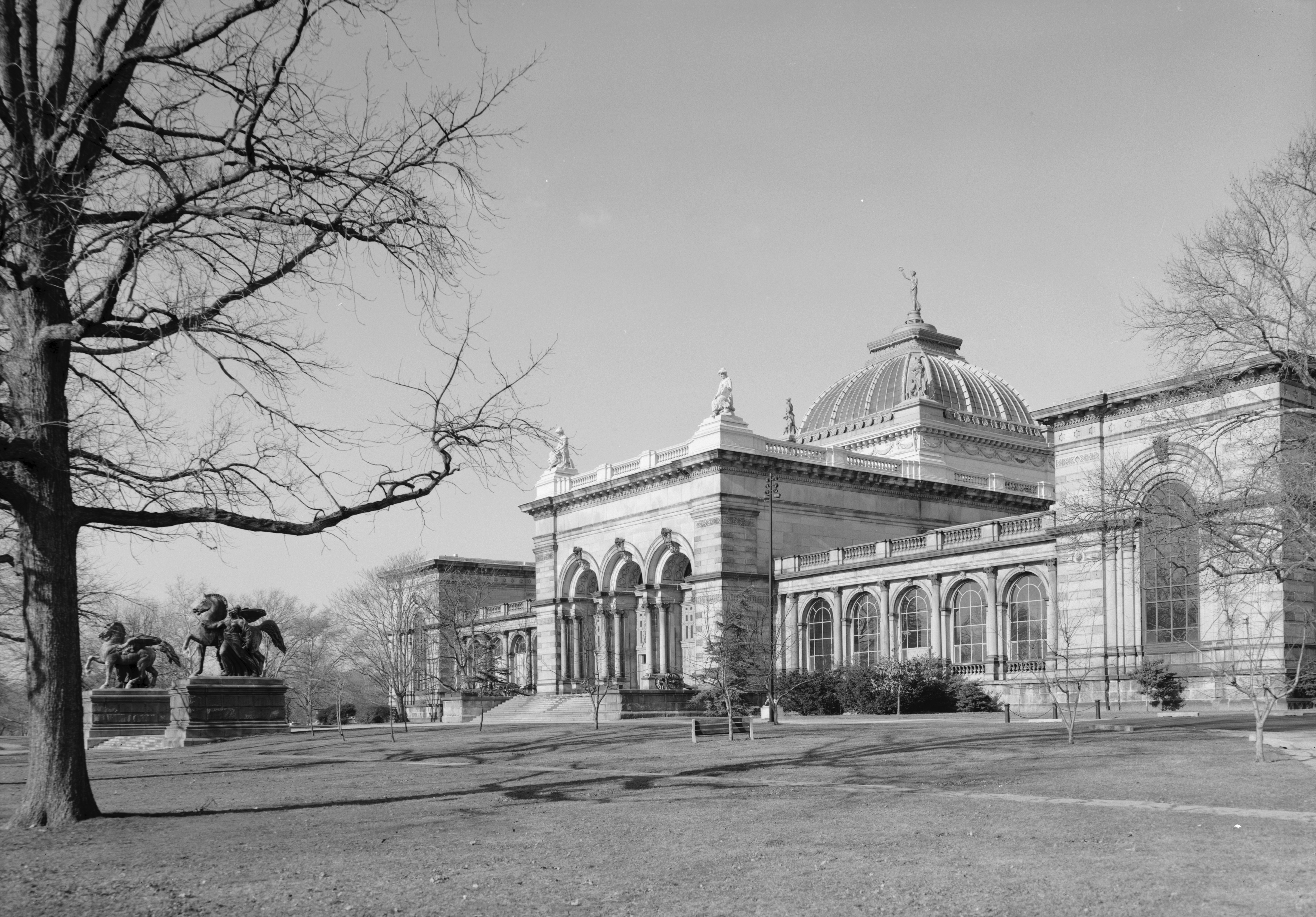 Memorial Hall, Philadelphia (cropped)